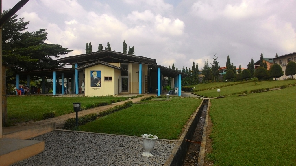 Cette paroisse est située au Centre de la Communauté des Pères Eudistes à Abata, quartier d'Abidjan.